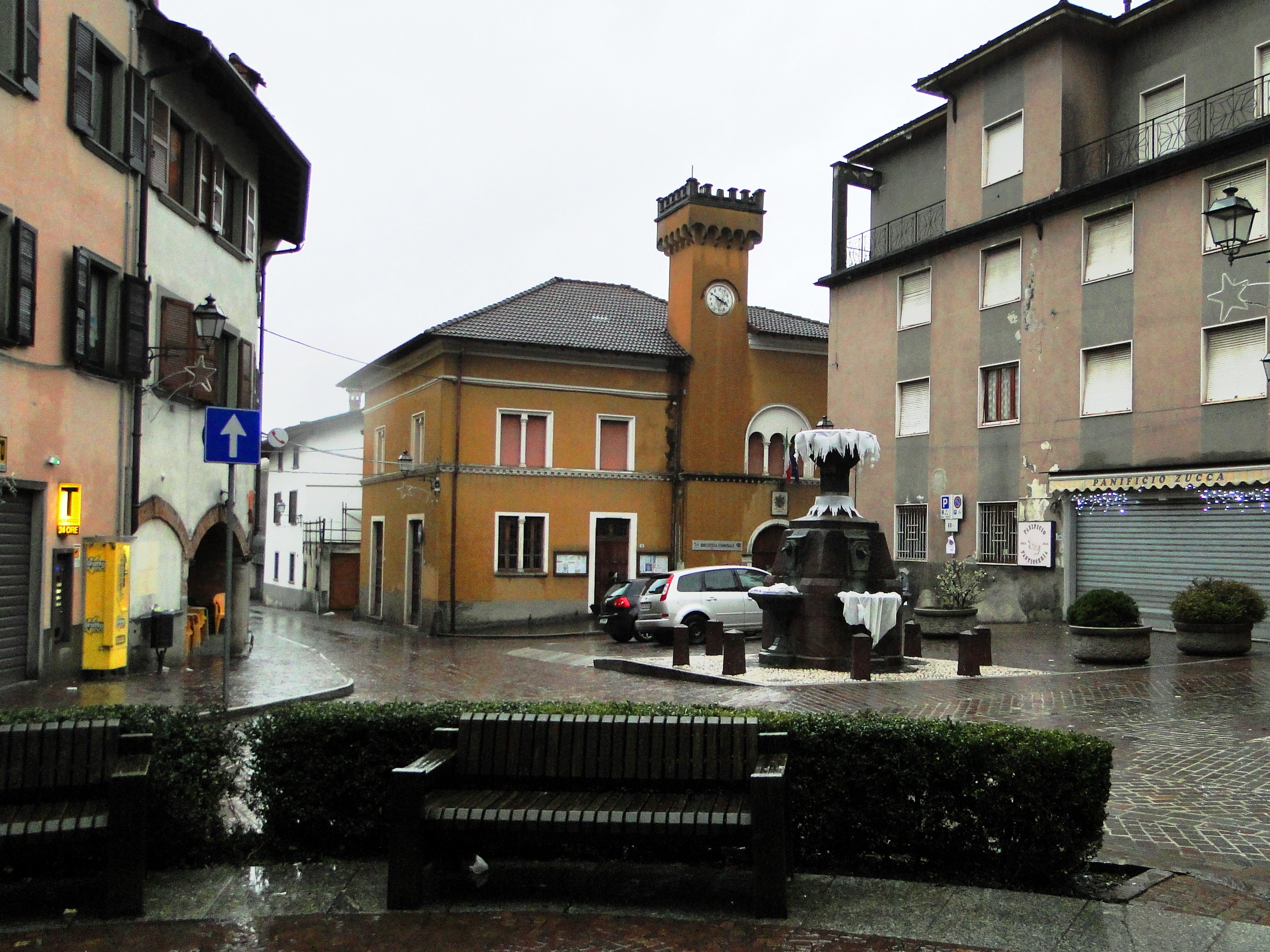 Vecchio municipio. Piazza Vecchia di Casnigo (BG)